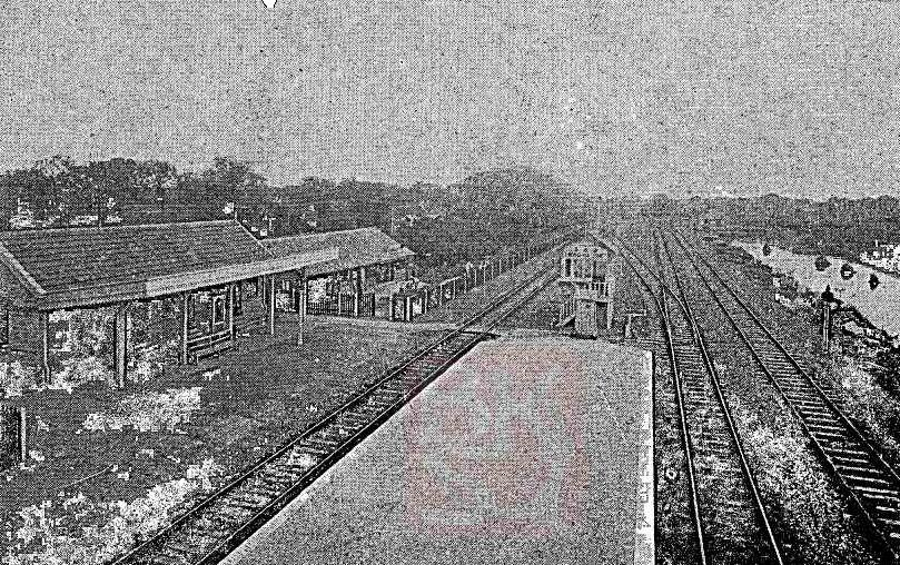 题名： 新龍華站：[照片] 文献来源： 《铁路公报:沪宁沪杭甬线》 出版时间： 1922 年 卷期(页)： [ 第70期 ，7页 ] 中图分类号： F532.6